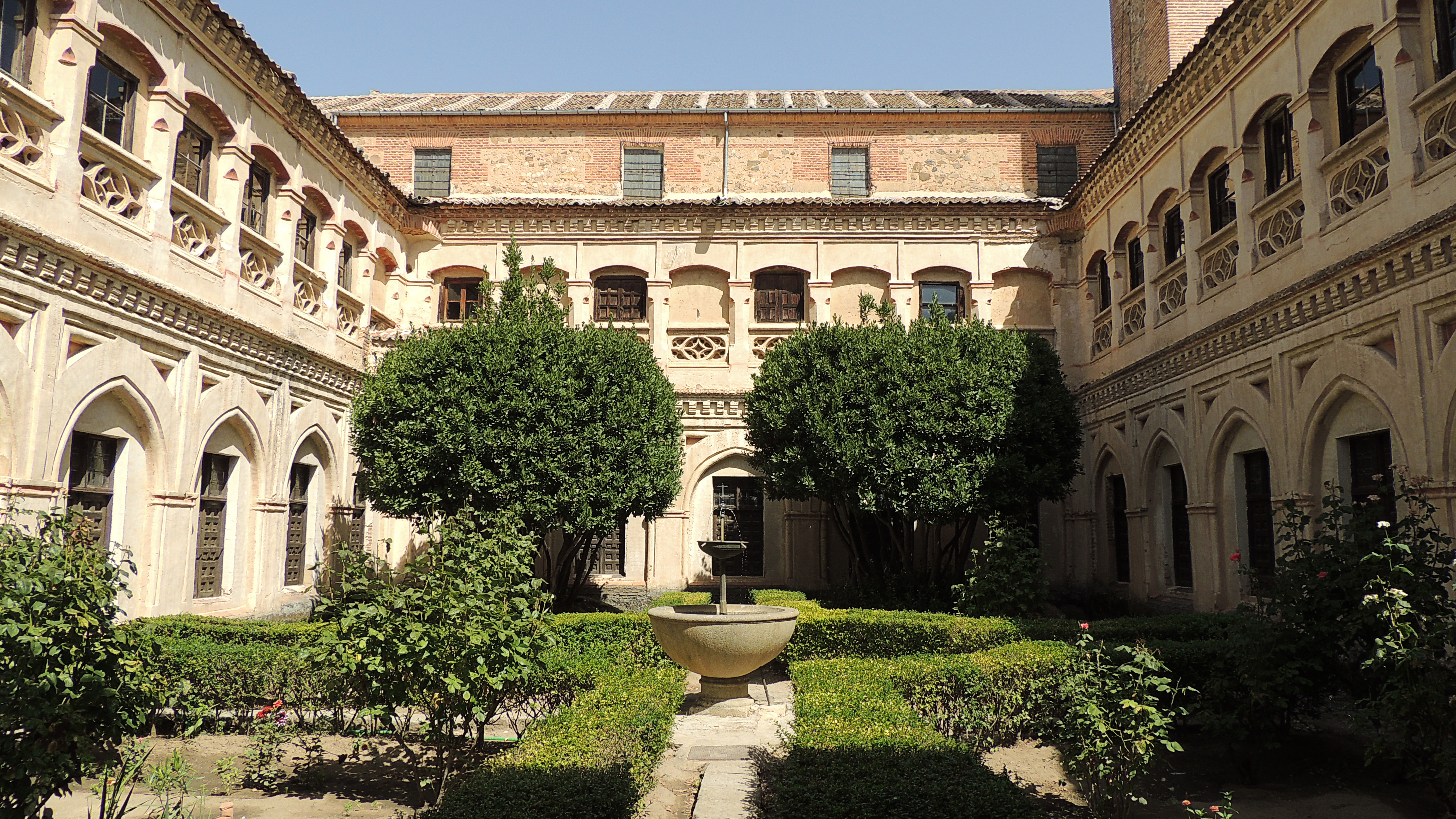 Claustro de San Antonio el Real